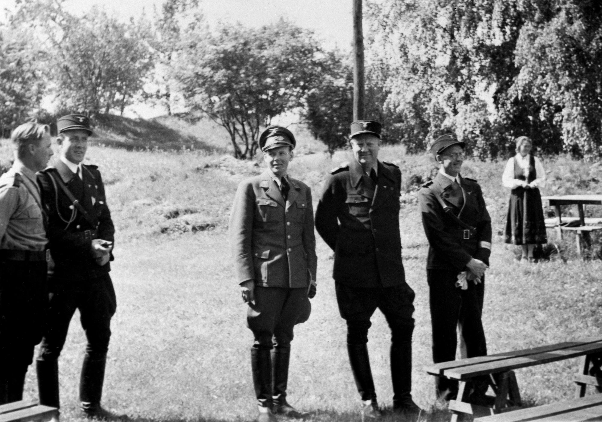 NS-MØTE, HAMARSTEVNE, FRA VENSTRE: HANS JACOB BRUUN OG BERTEL BRUUN, KANSELLISJEF ØRNULF LUNDESGAARD, VIDKUN QUISLING, ANTON BRYNHILDSVOLL, FYLKESFØRER I NS I FO4, DOMKIRKEODDEN OG HEDMARKSMUSEET. Nasjonal samling.